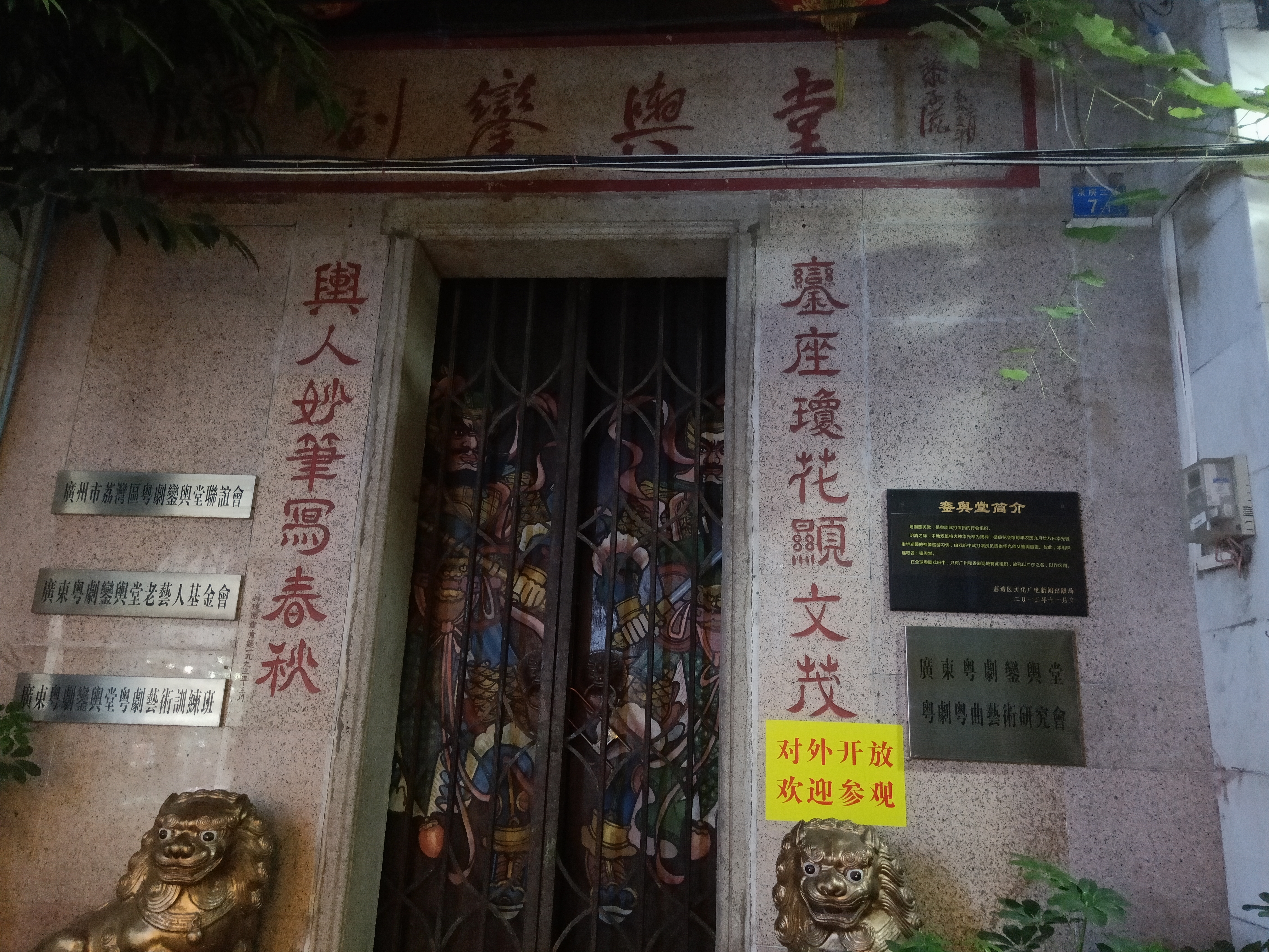 粵語: 粵劇鑾輿堂